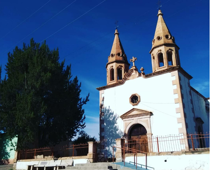 Iglesia de San Lorenzo, Buenaventura, Chihuahua.